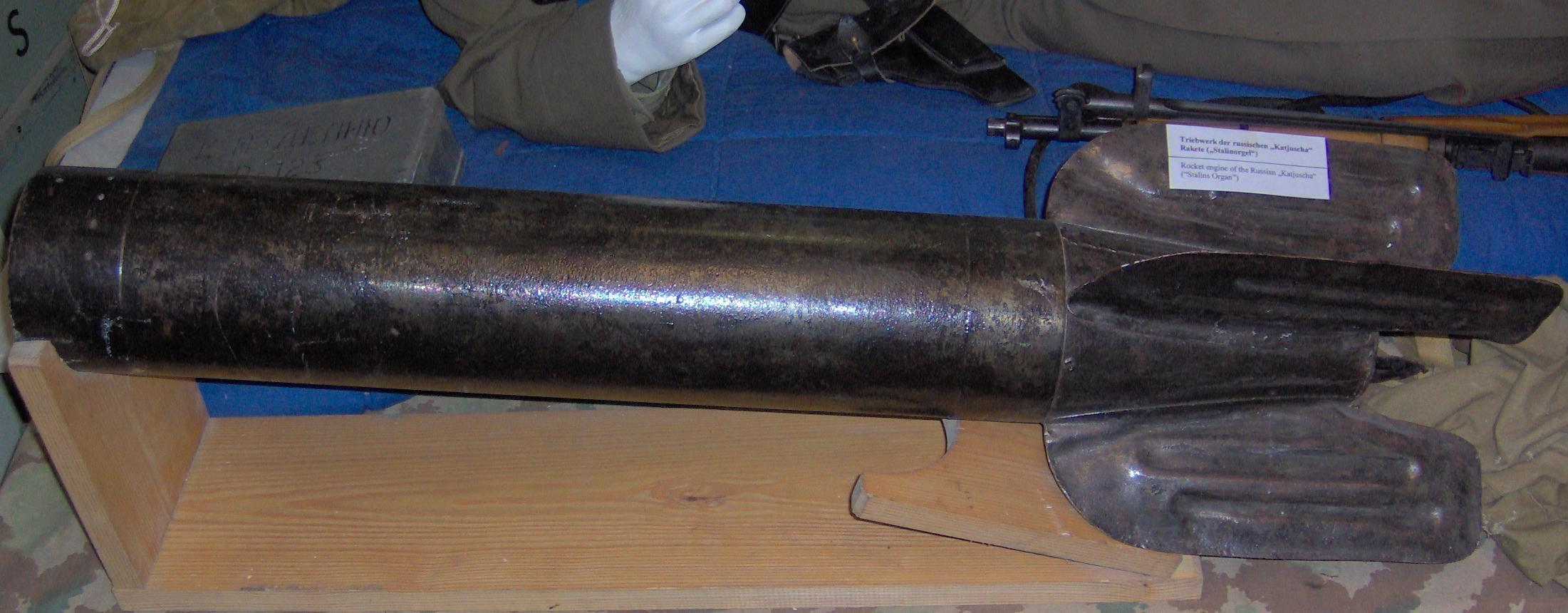 Triebwerk der Katjuscha-Rakete